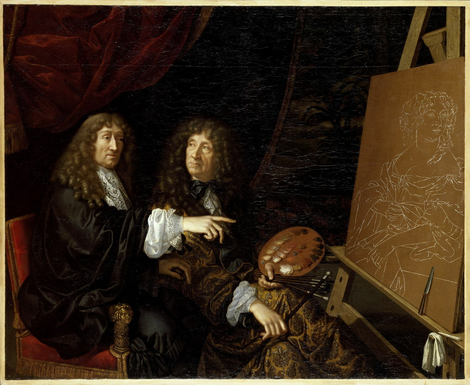 Henri et Charles Beaubrun peignant un portrat de la reine Marie-Thérèse. Morceau de réception à l'Académie en 1675.